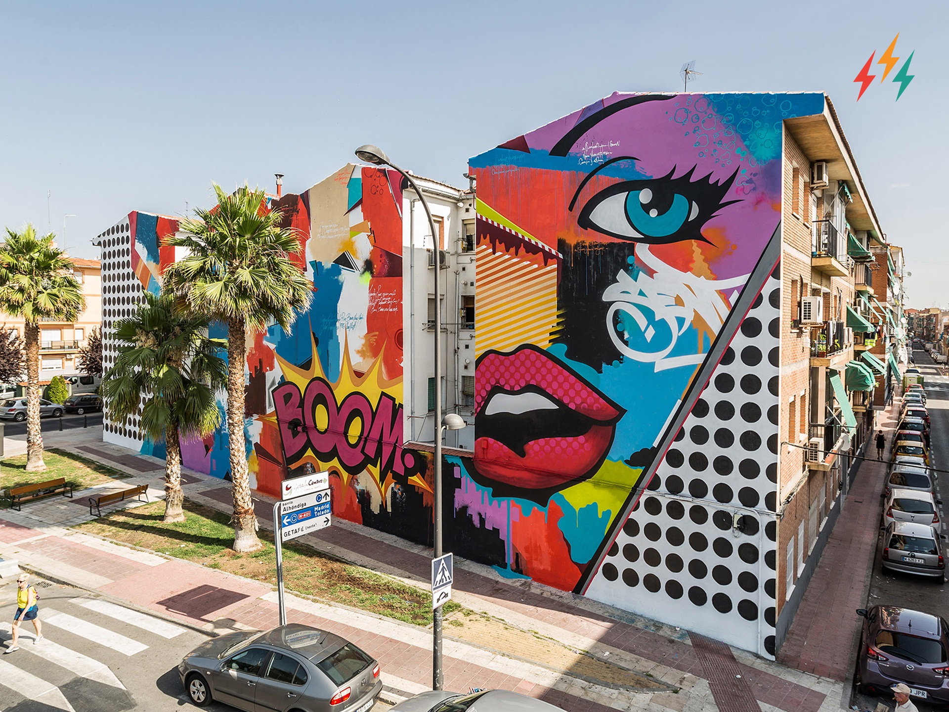 Intervención urbana del artista Sen2 durante el Festival Cultura Inquieta